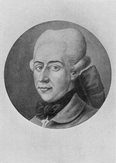 Georg Friedrich Schmoll Maler , der von Lavater mitgenommene Zeichner, dem wir Goethes und seiner Eltern Bildnisse verdanken. Selbstbildnis